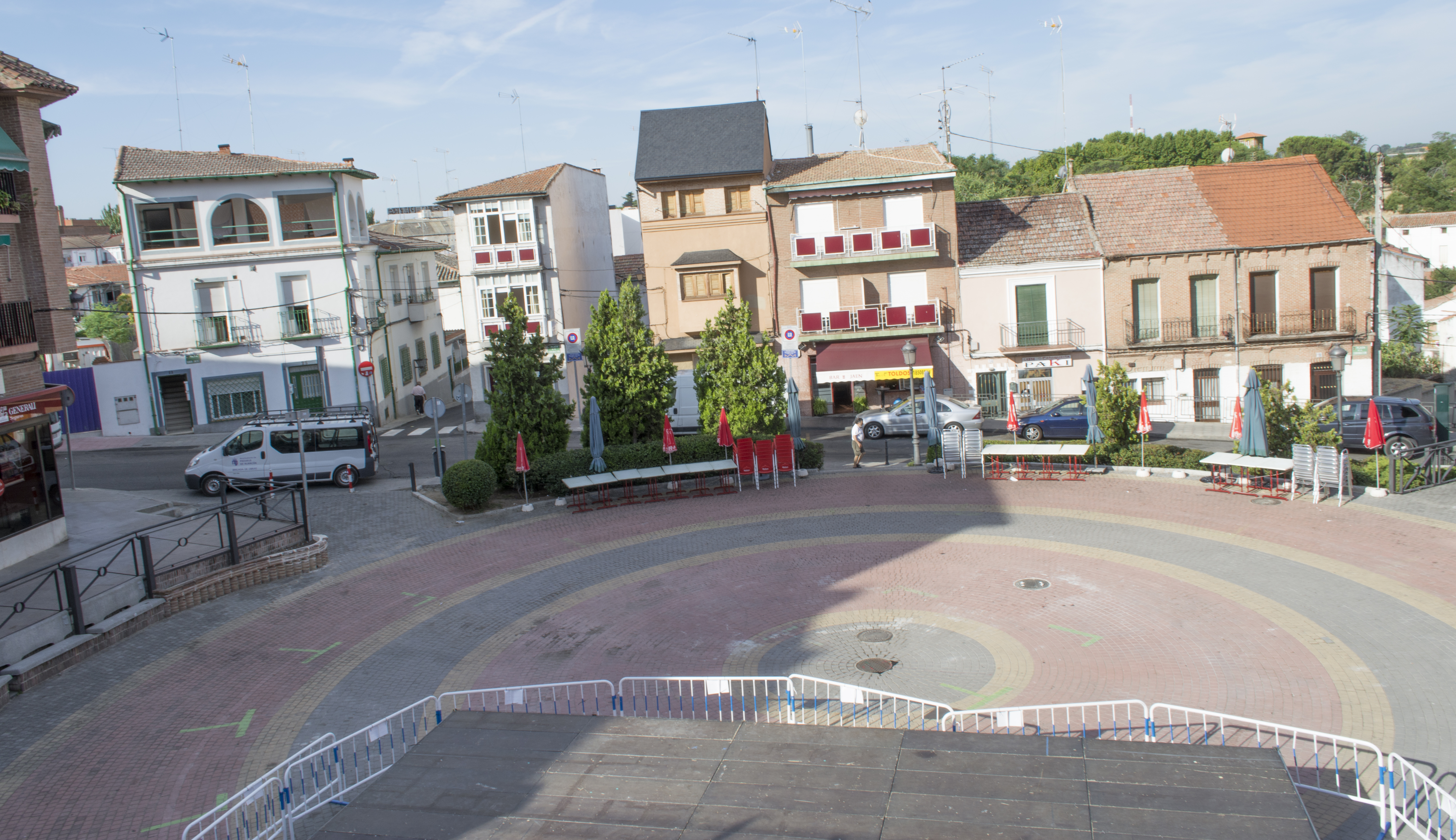 Plaza de la Coronación de Pozuelo de Alarcón, que acogió originalmente el recinto de la plaza de toros del municipio. Fotografiada desde el balcón de la parroquia Asunción de Nuestra Señora.